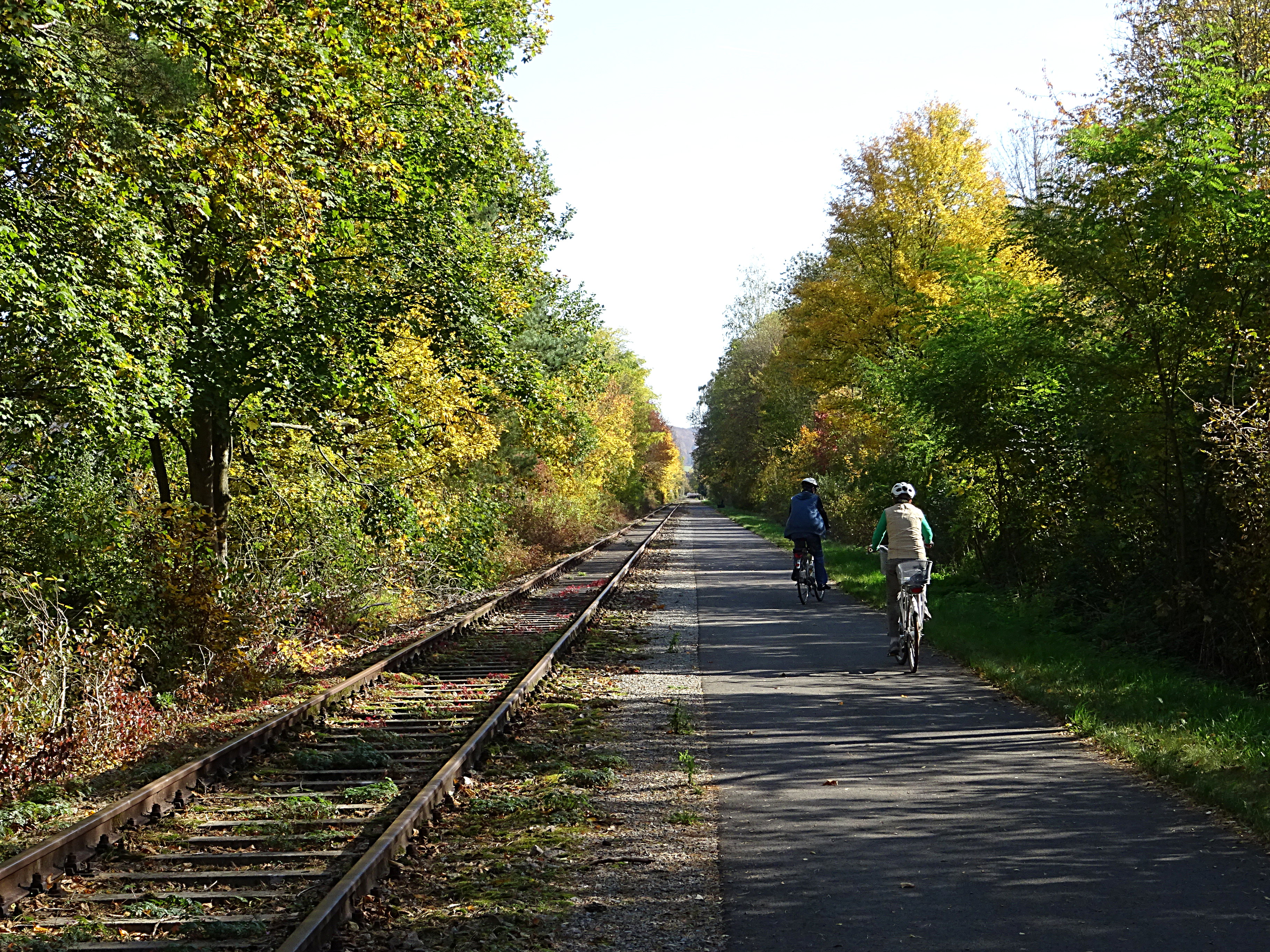 der Kanonenbahn-Radweg etwa Höhe Lutter-Mündung in die Frieda